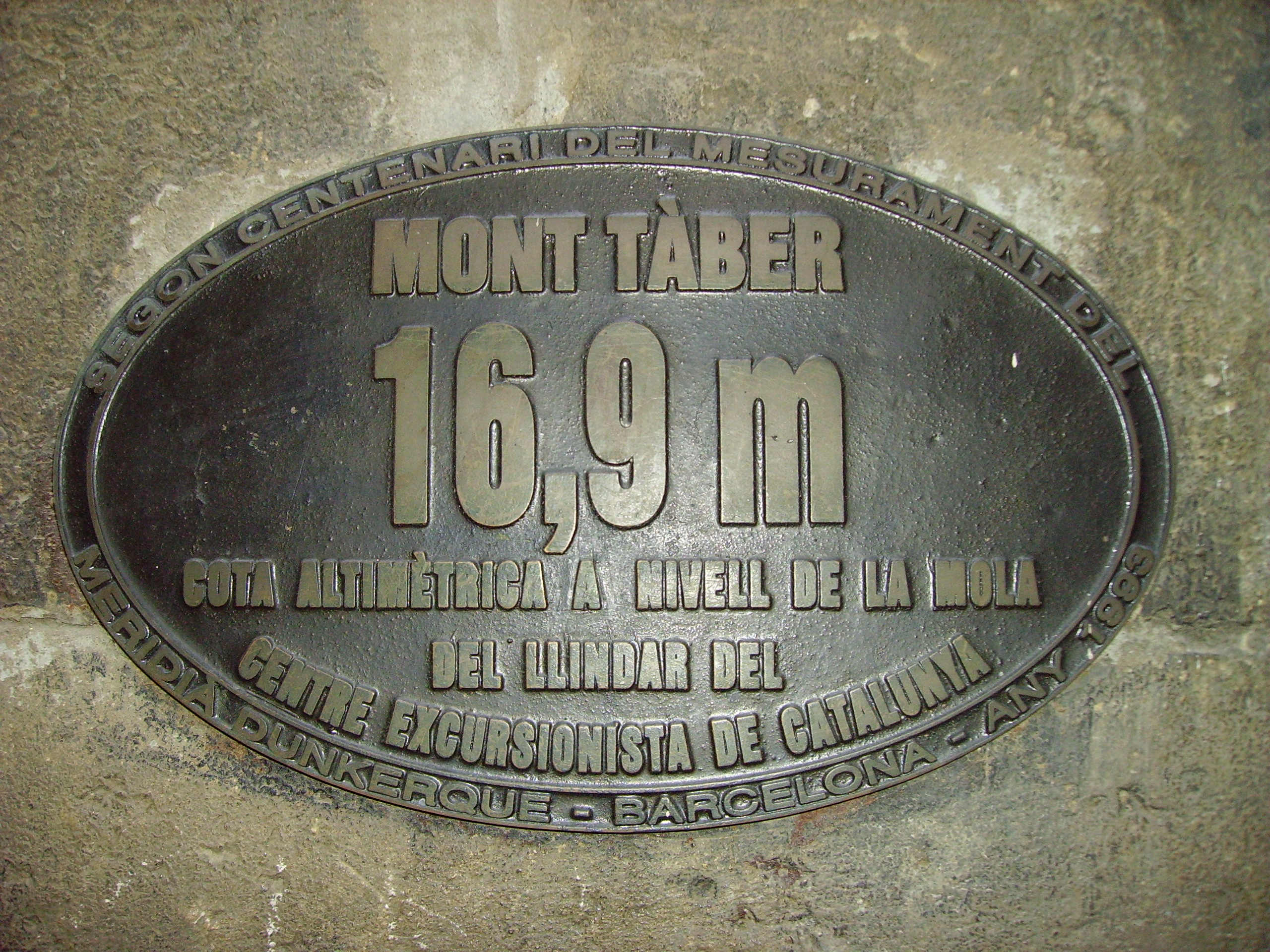 Placa d'altitud del turó del Mont Tàber, al barri gòtic de Barcelona.